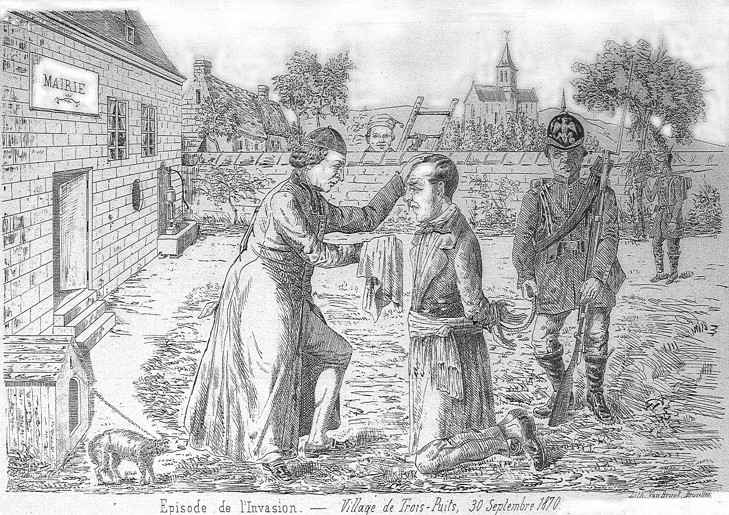 Vue de Trois-Puits, le maire, prisonnier d'un prussien, est soigné par le curé sous l'oeil d'un habitant.